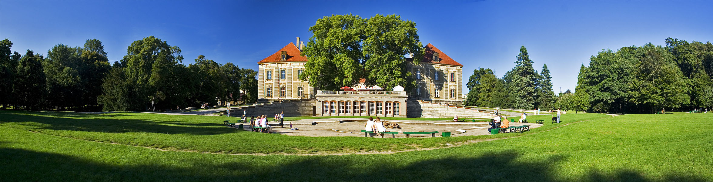 Panorama pałacu w Żaganiu